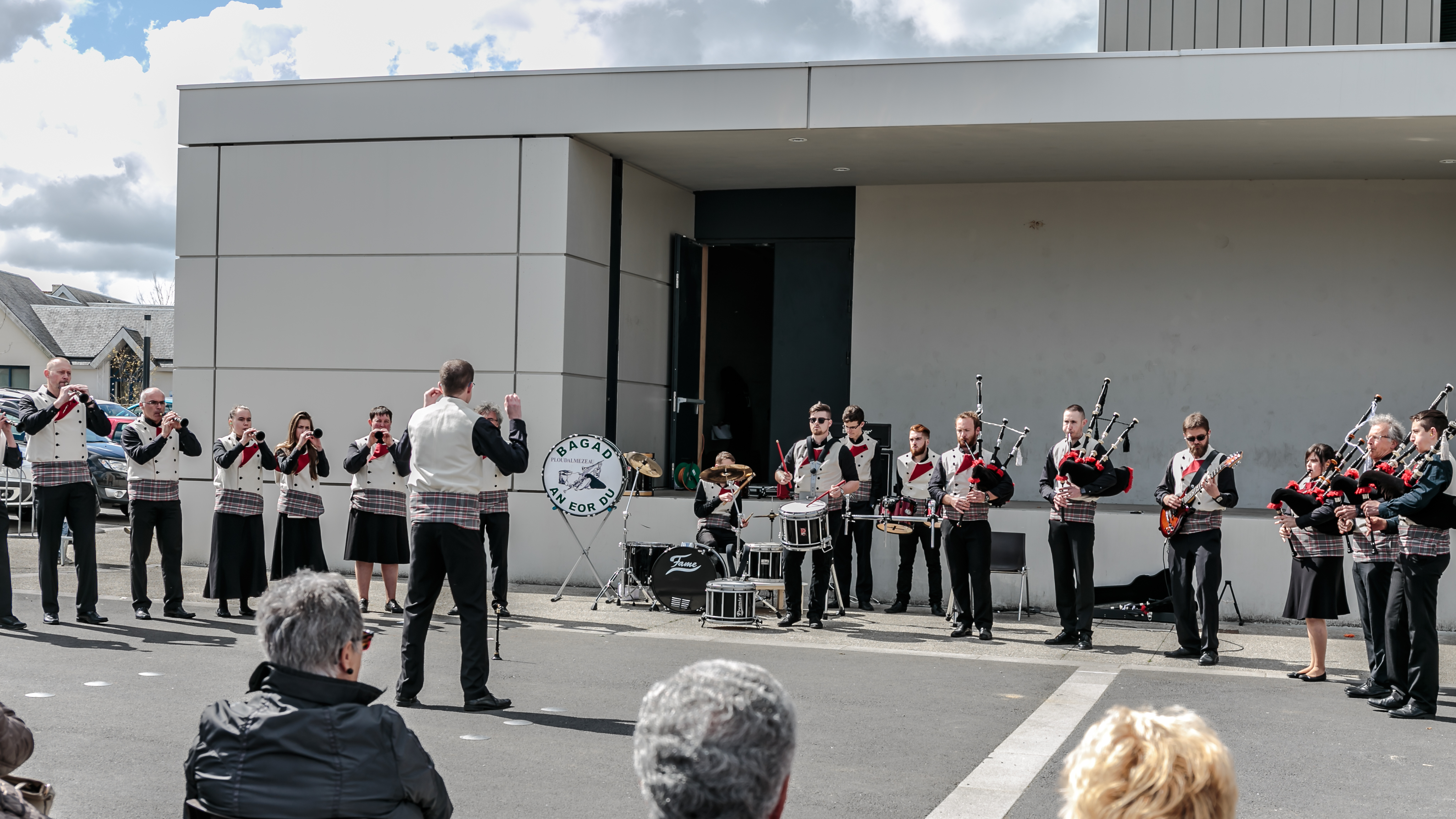 Prestation du Bagad an Eor Du de Ploudalmézeau pour les 21 ans du bagad Bro An Aberioù à Plabennec le 16 avril 2016.